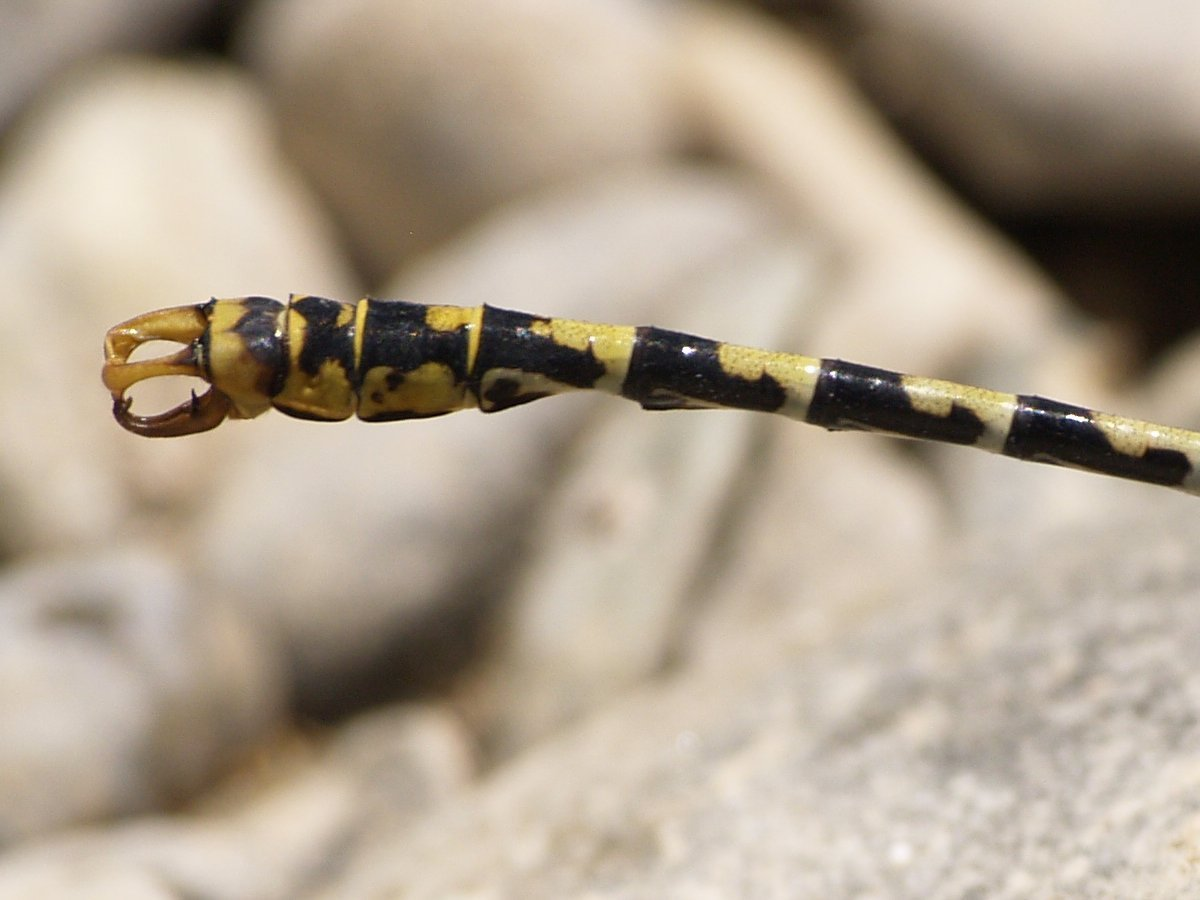 Onychogomphus forcipatus cercoides